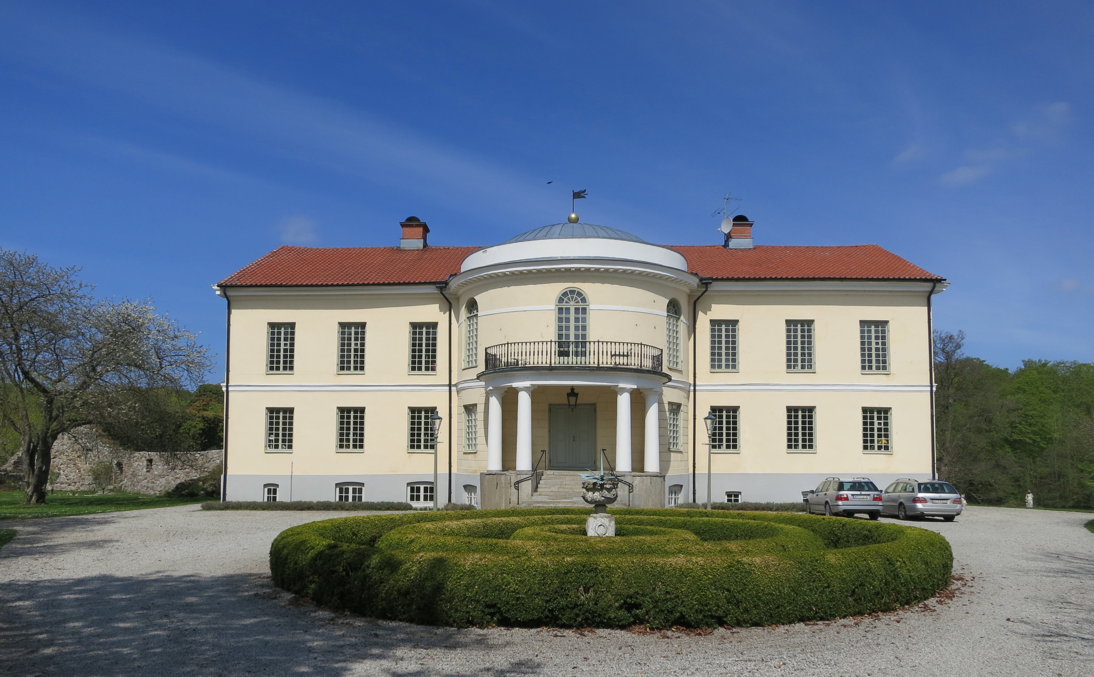 Gyllebo slott i Skåne